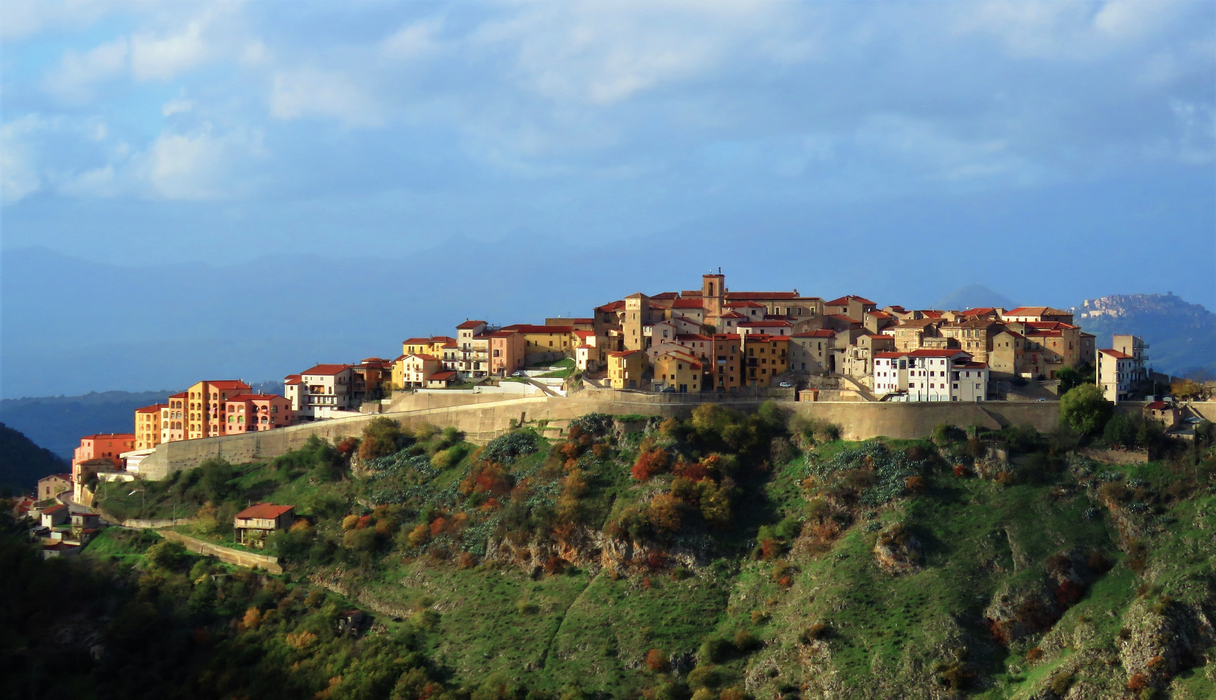 Panorama di Salvitelle